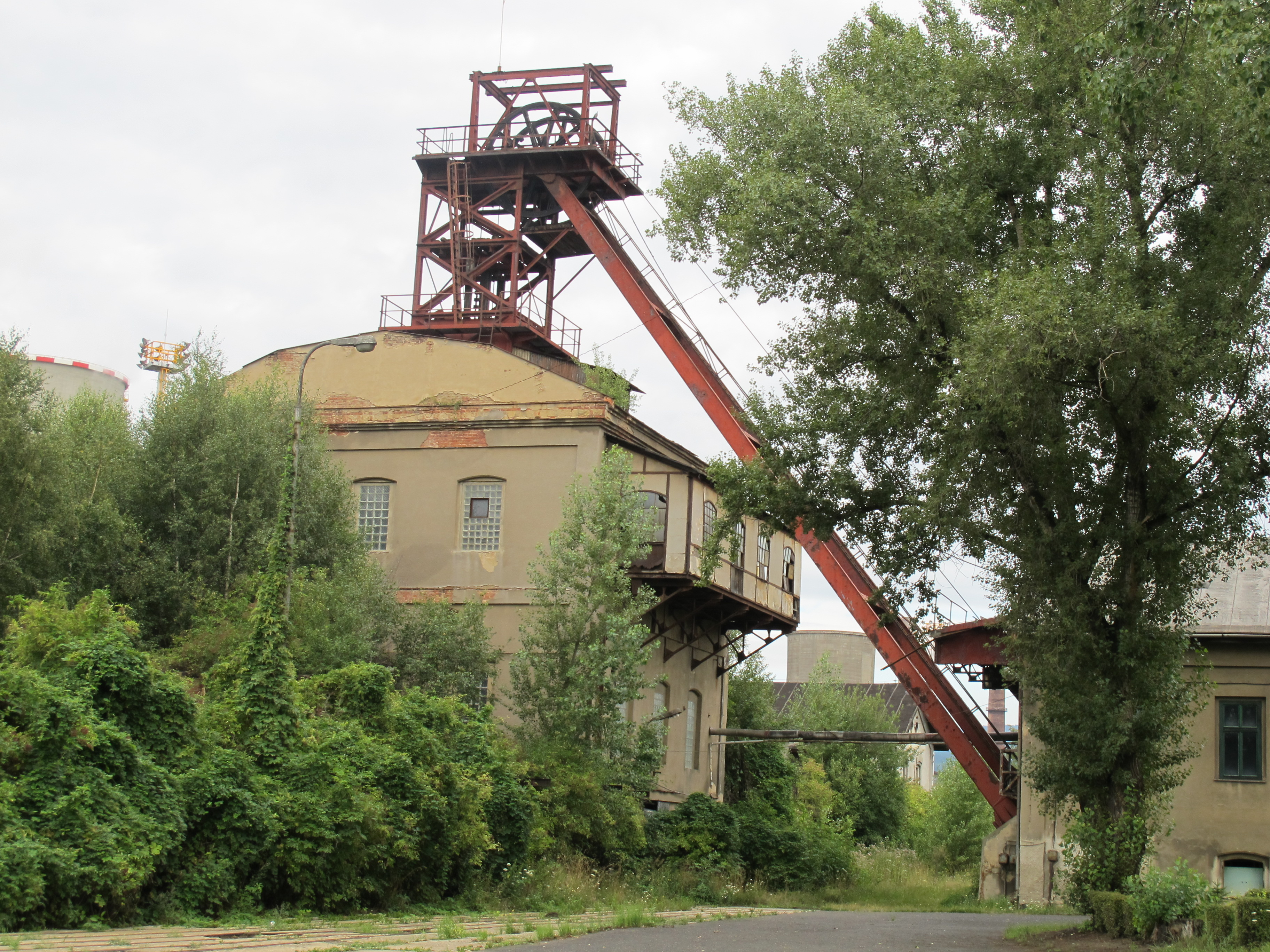 Hlubinný uhelný důl Julius III, dnes Podkrušnohorské technické muzeum - těžní věž